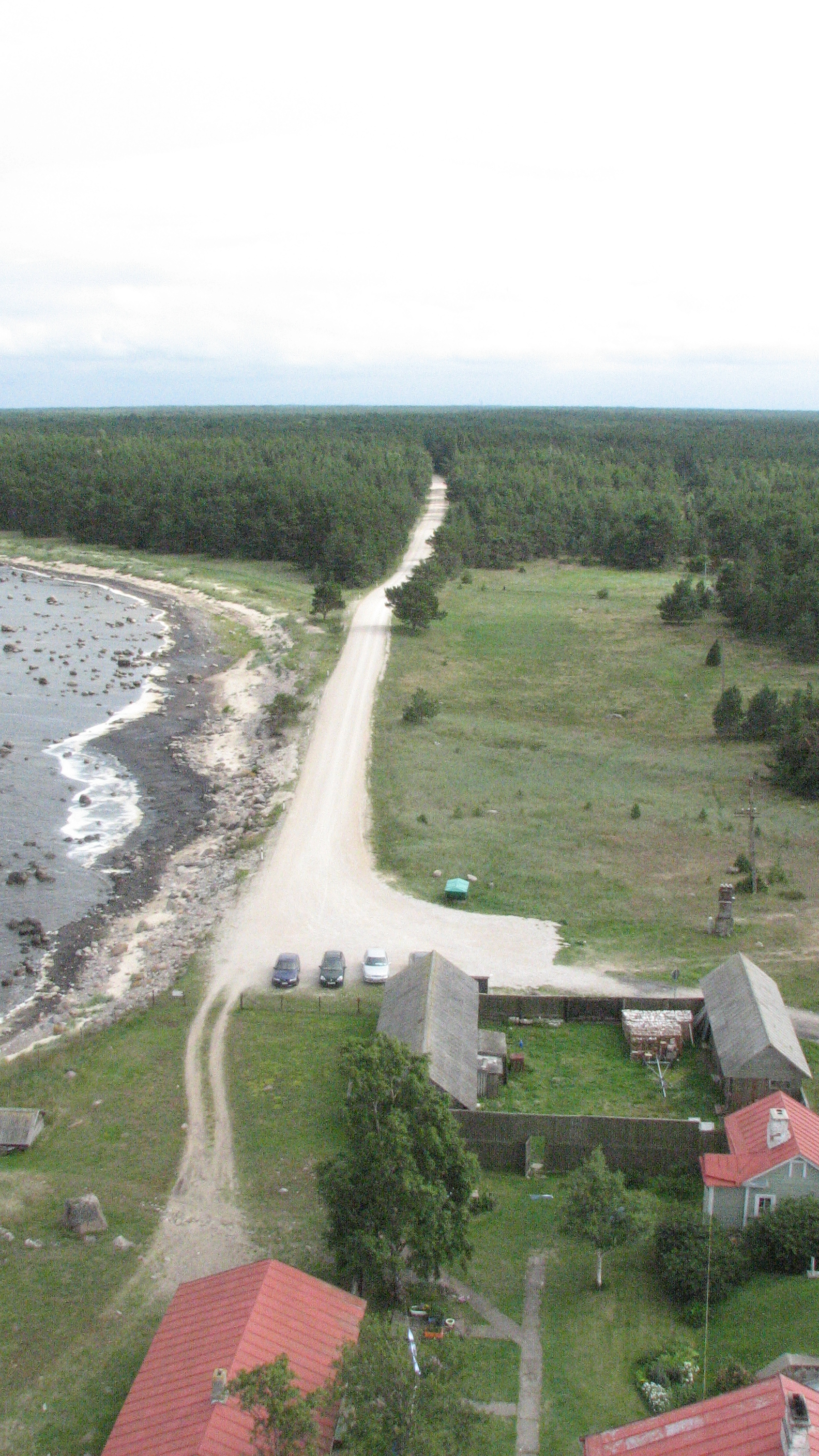 Tahkuna majaka tee